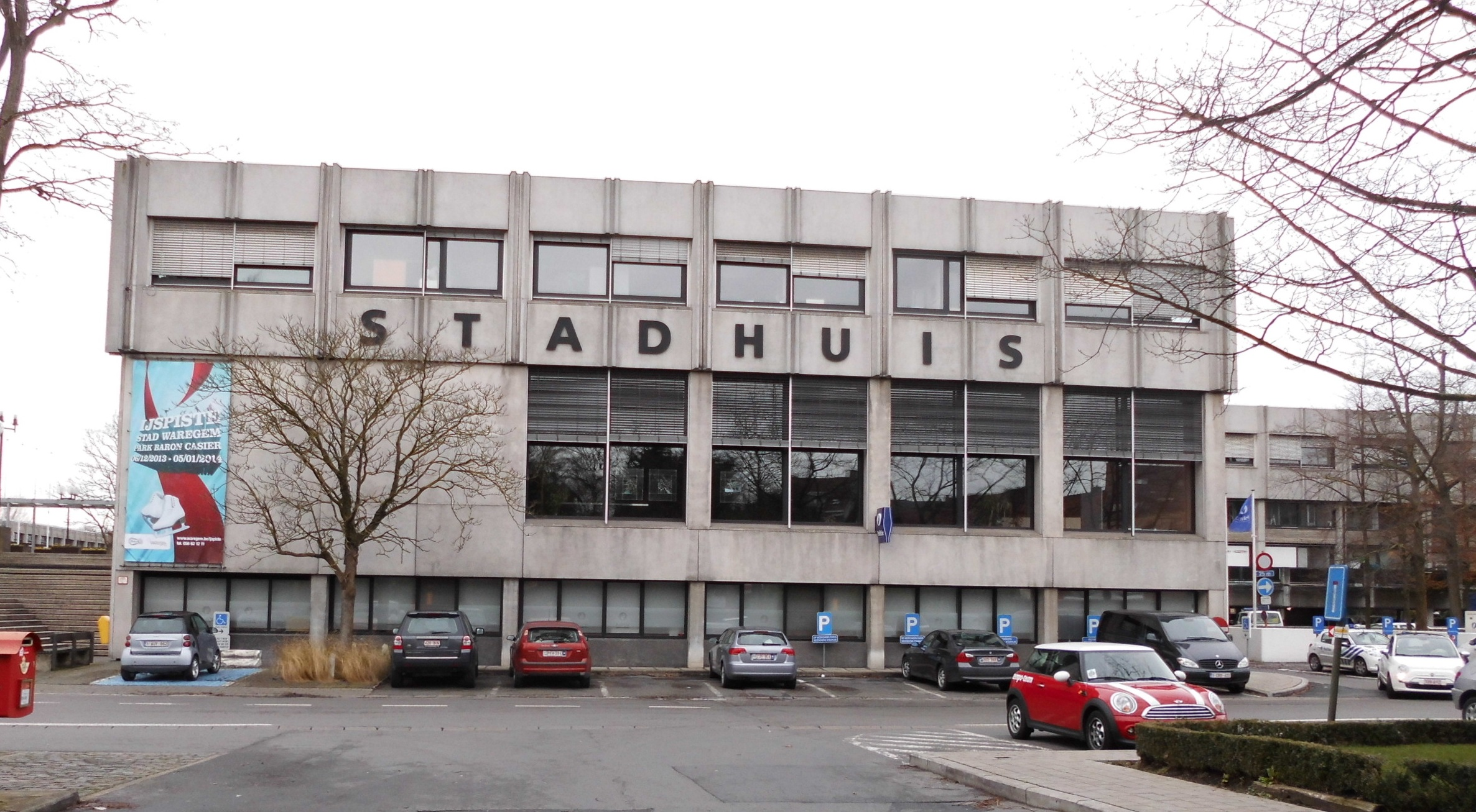 Stadhuis van Waregem - Gemeenteplein - Waregem - West-Vlaanderen - België